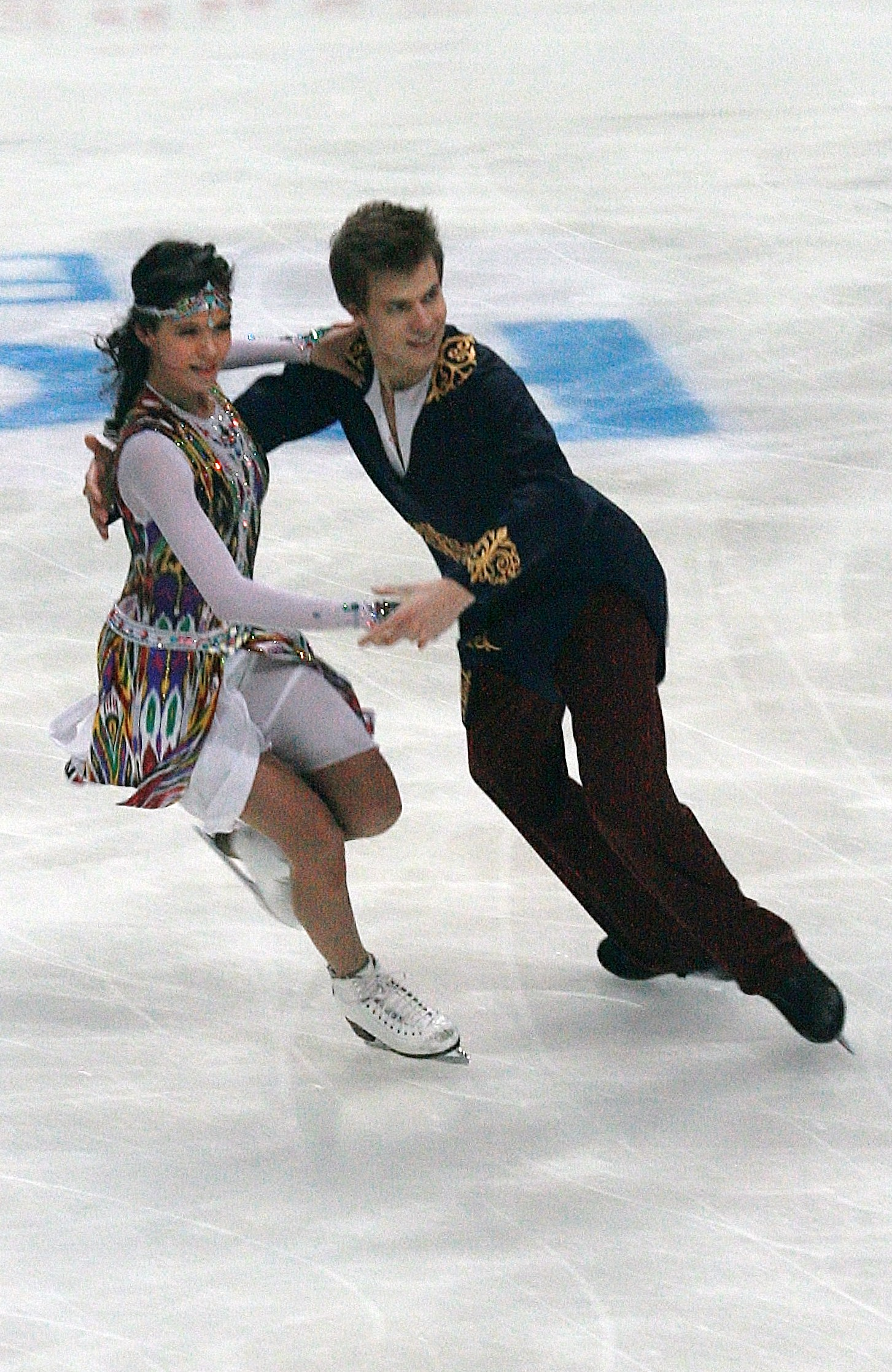 Елена Ильиных и Никита Кацалапов на Кубке Ростелекома 2012. Короткий танец (андижанская полька).